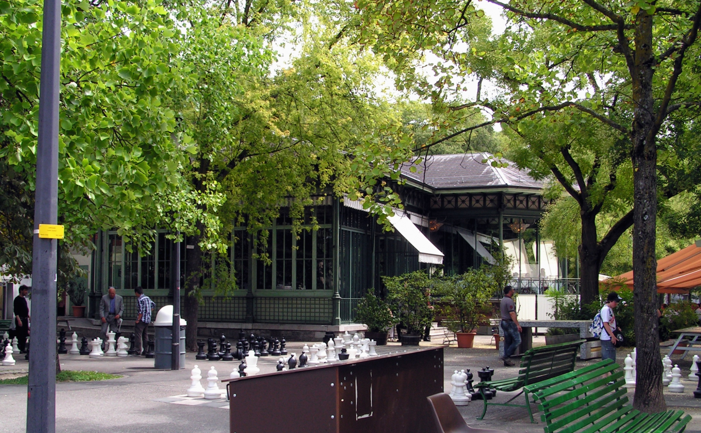 Genève. Parc des Bastions. Le kiosque et les jeux d'échecs.